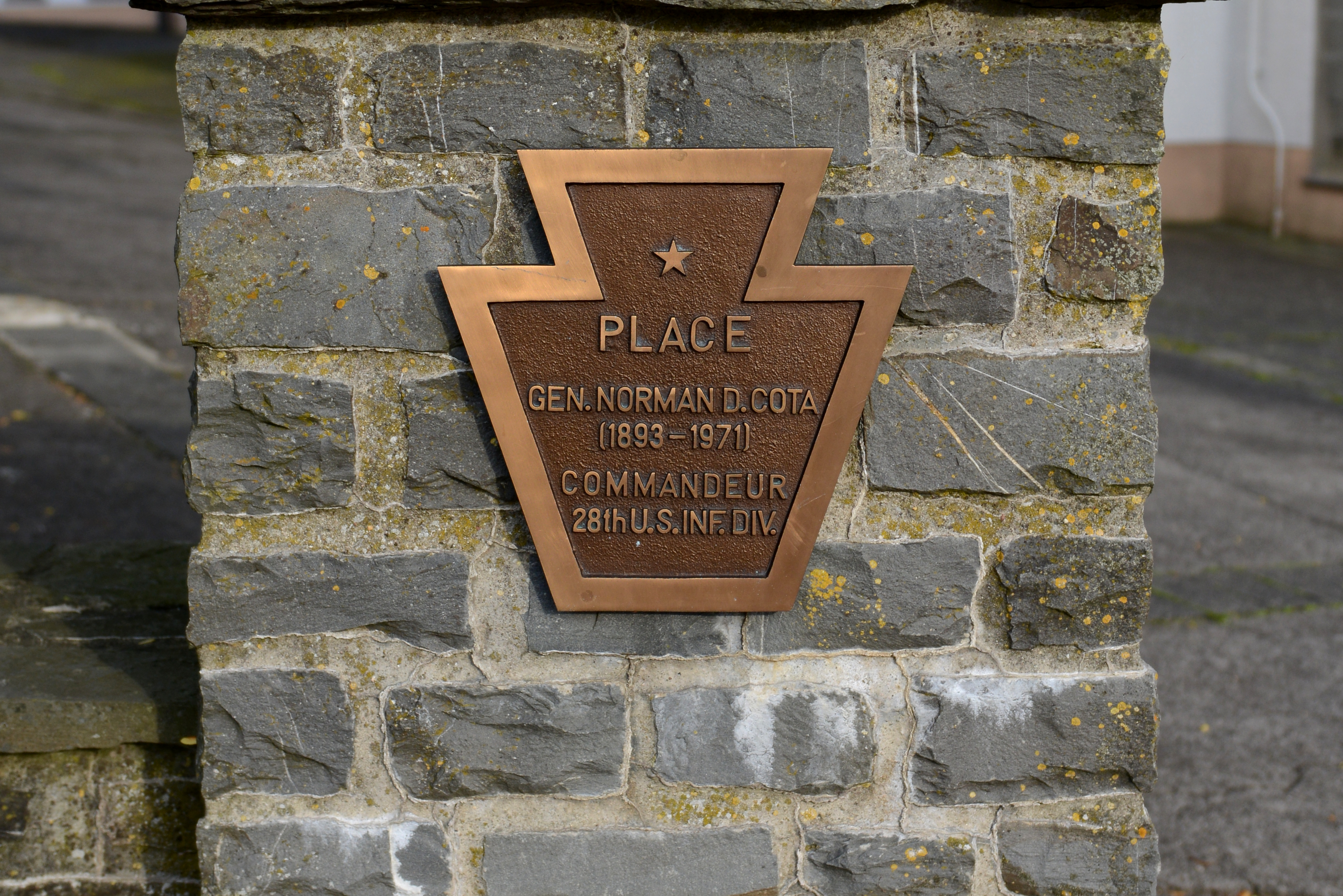 D'Plack op der Plaz Generol Norman D. Cota bei der Kierch zu Buerschent. Se erënnert un de Generol Cota (1893-1971), de Commandeur vun der 28th U.S. Infanterie Divisioun.